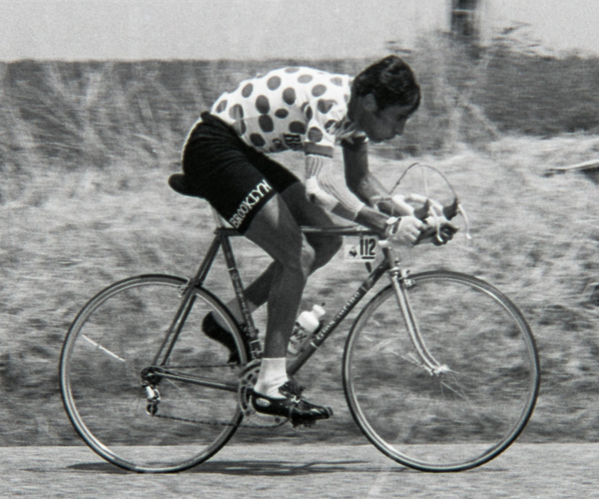 Giancarlo Bellini durant le Tour de France 1976. Photographie : René Milanese